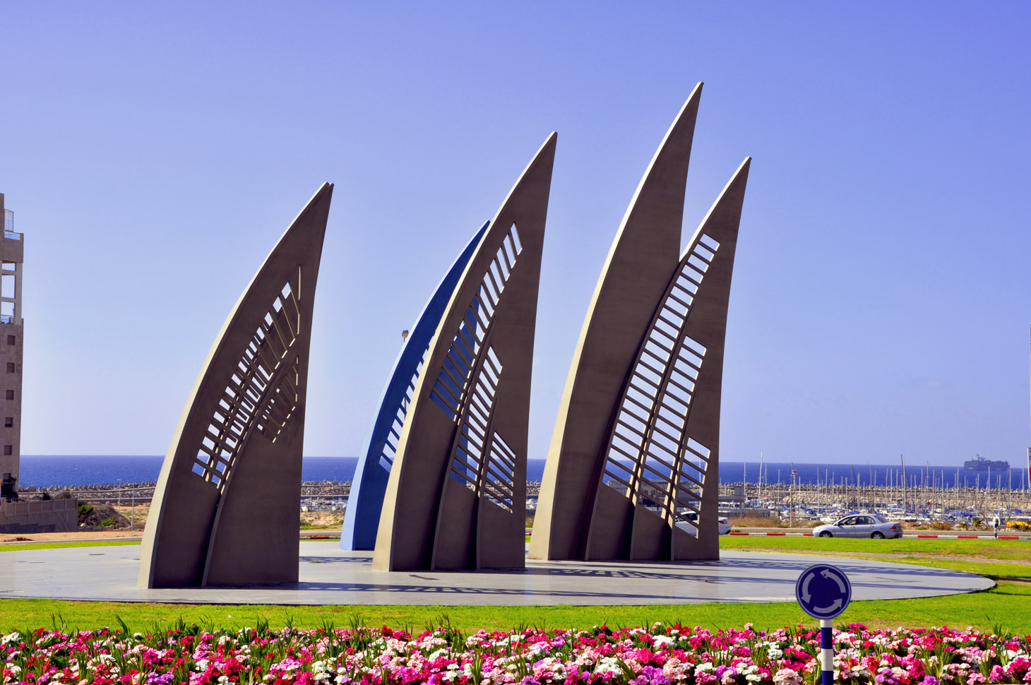 Sculpture on Exodus